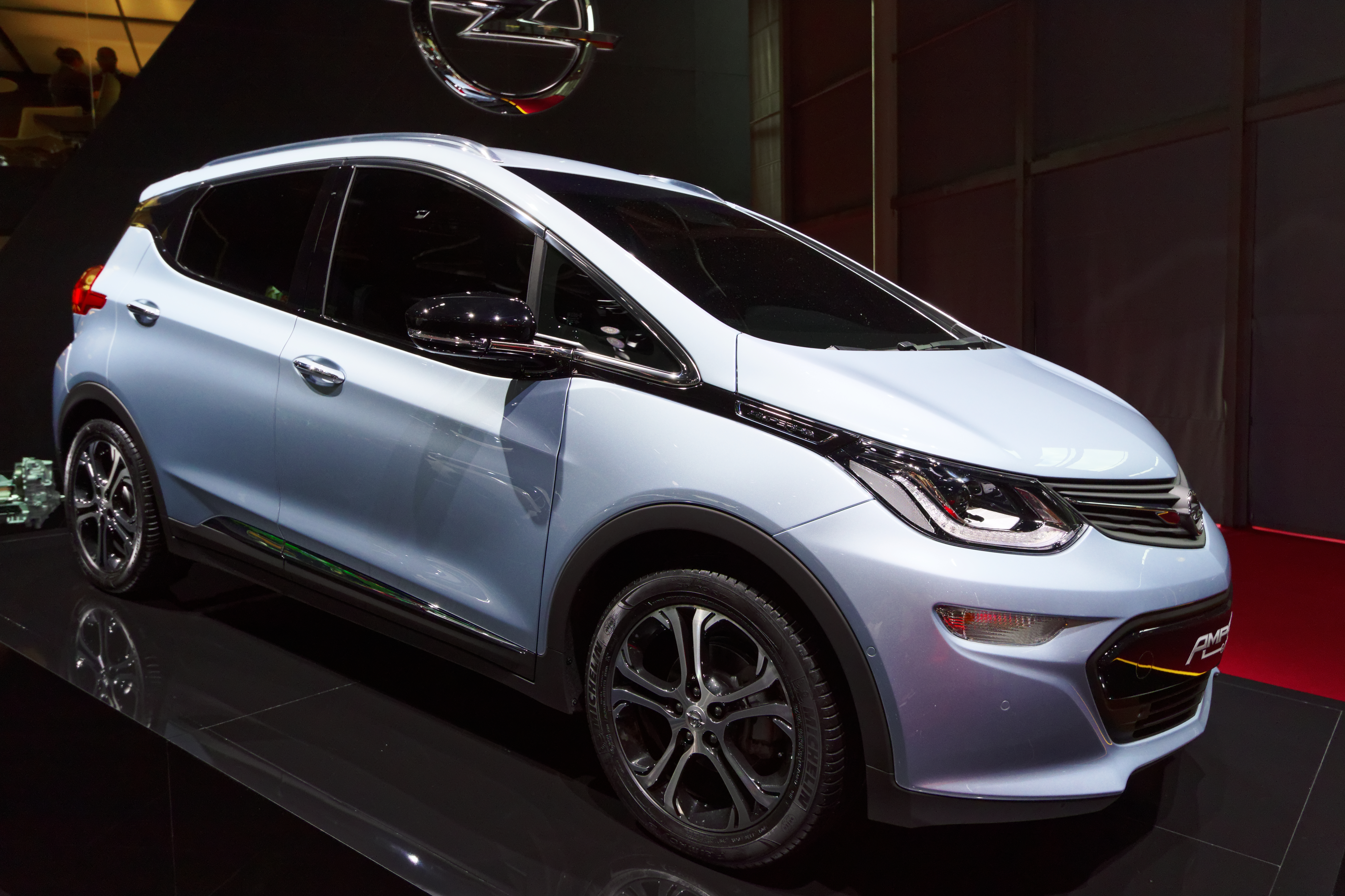 Une Opel Ampera-E présentée lors du mondial de l'automobile de Paris 2016.